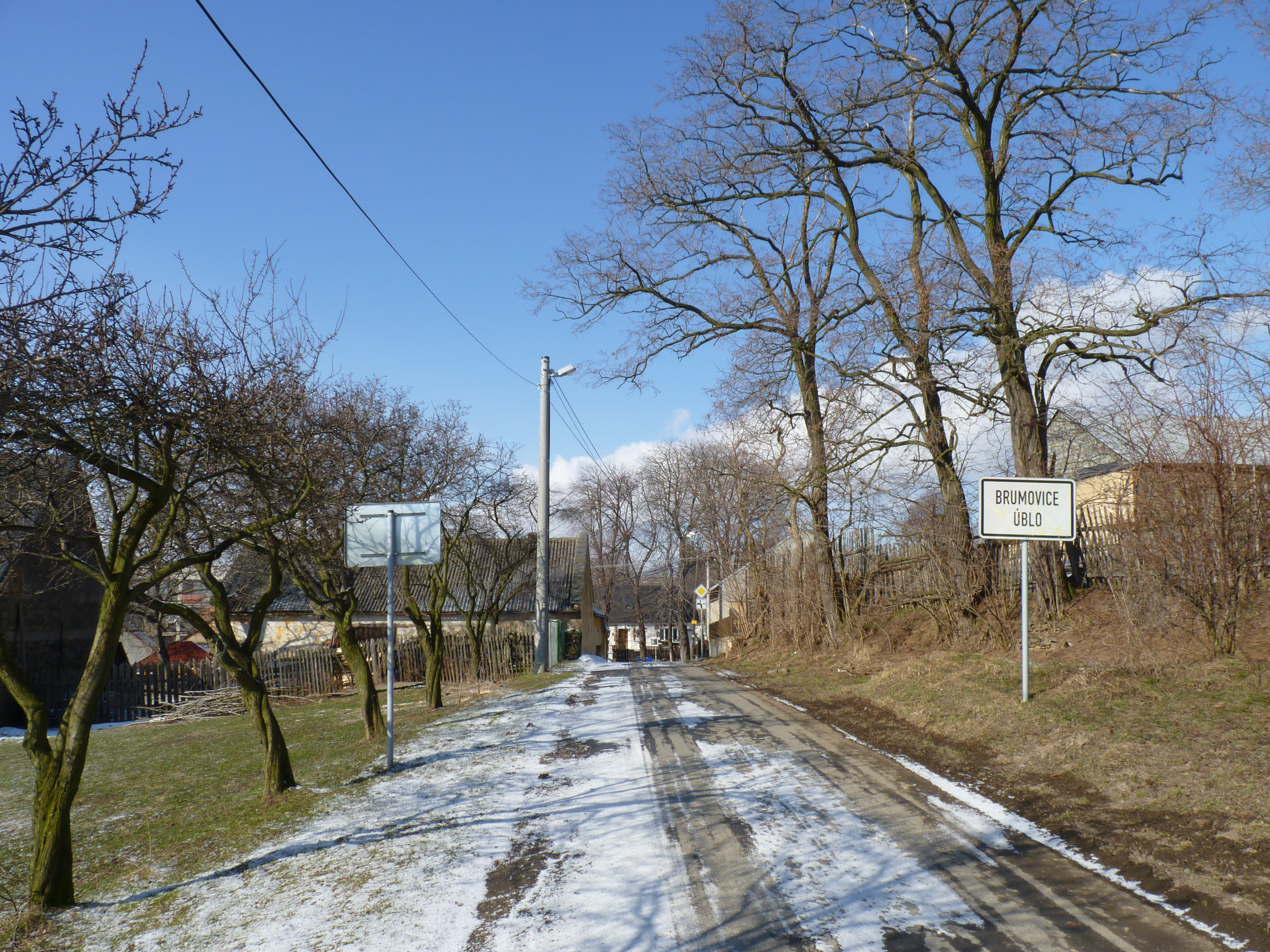 Úblo (část obce Brumovice), okres Opava, Moravskoslezský kraj